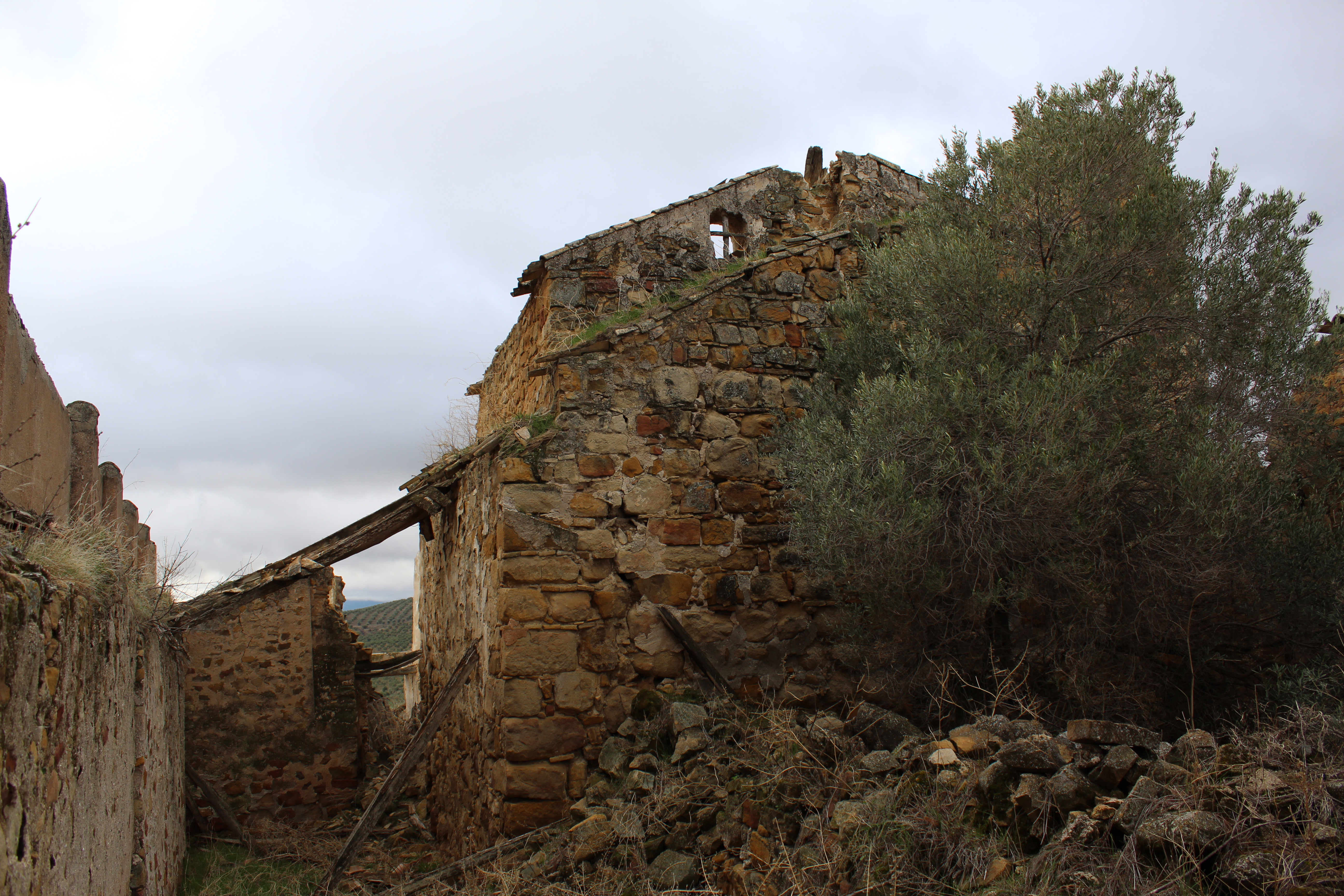 Vista trasera de la Torre de Macarena y edificaciones anejas.